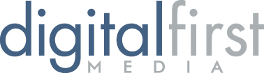 Digital First Media logo